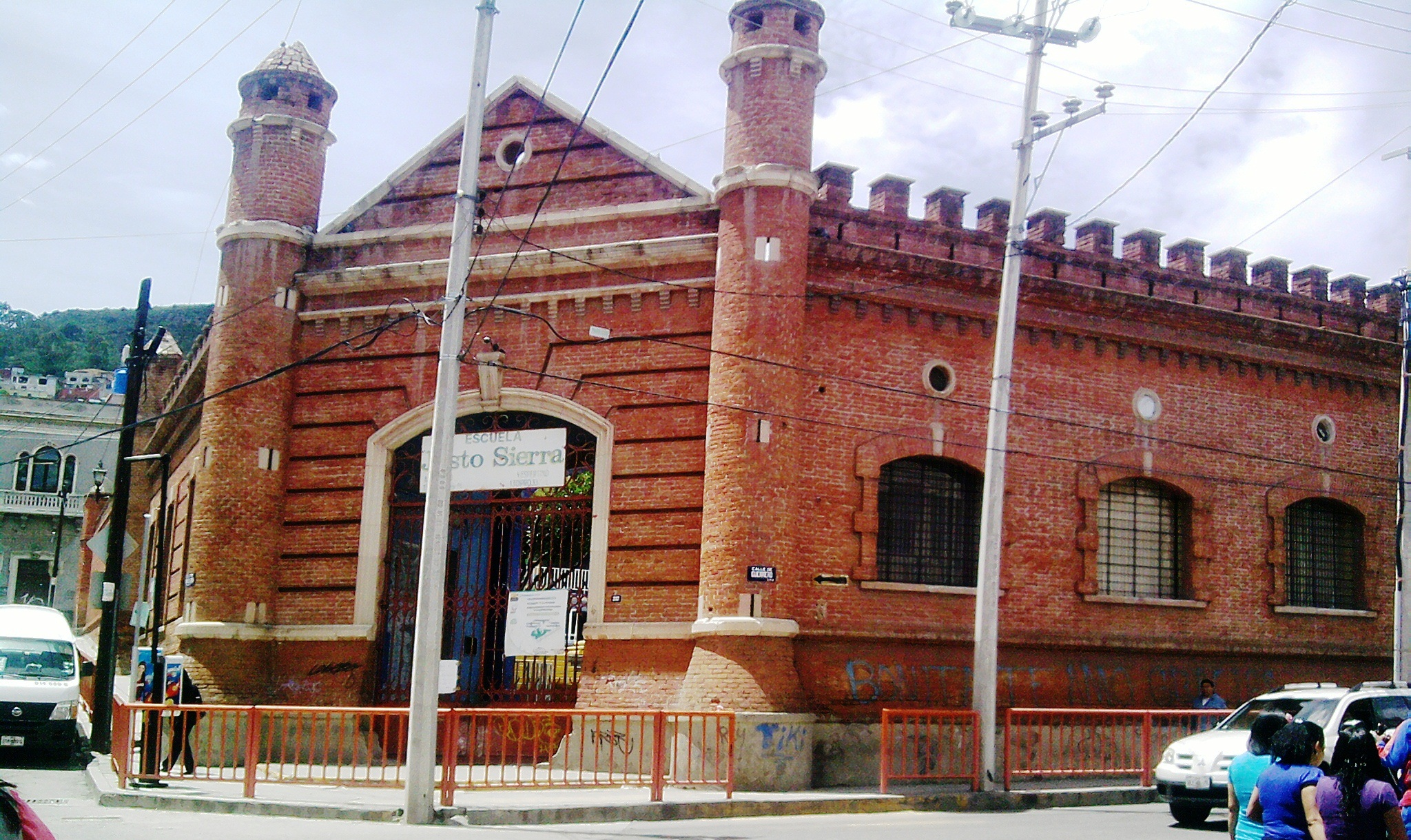 Escuela Justo Sierra en Pachuca Centro — estado de Hidalgo, México.